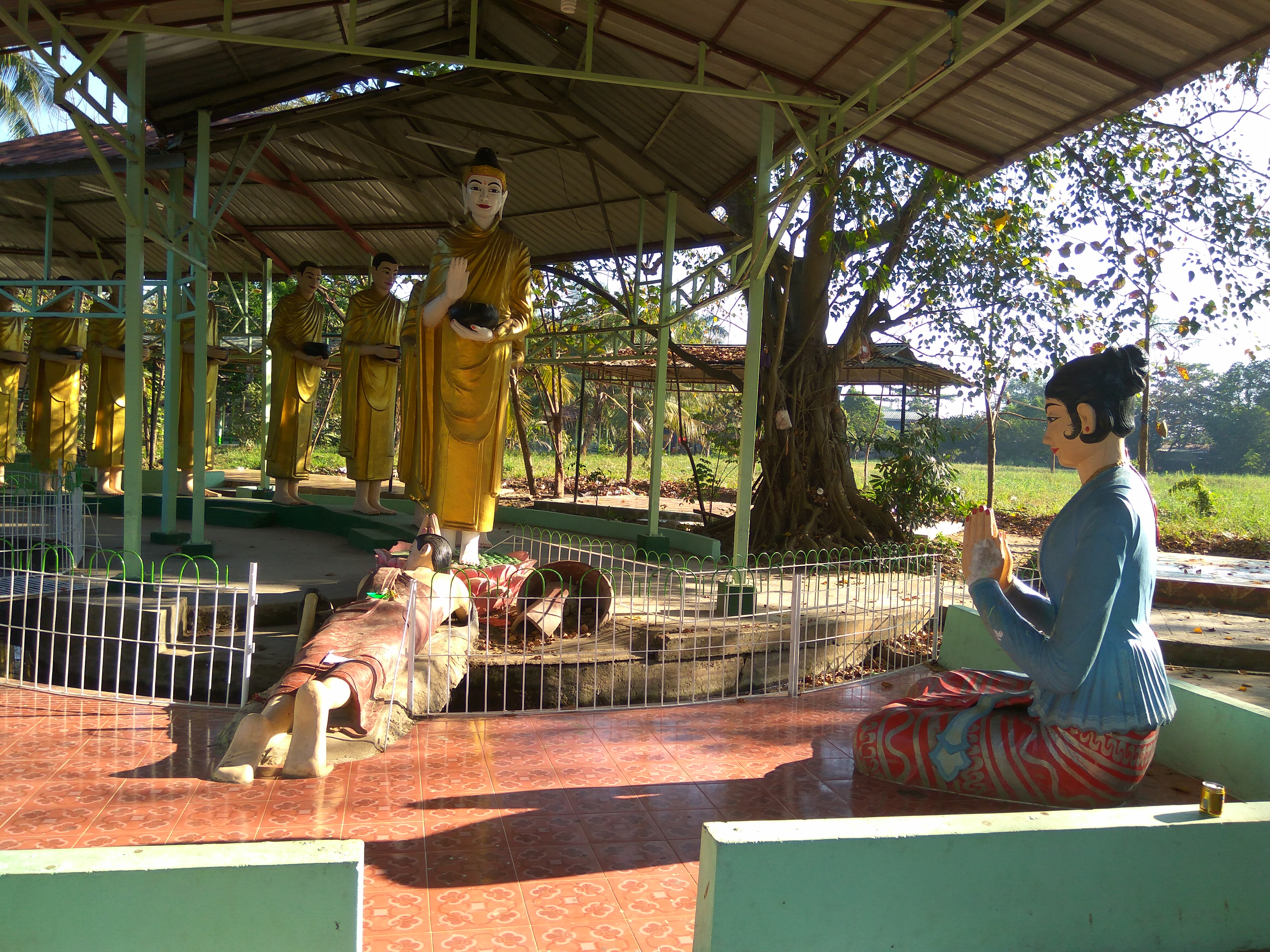 မြန်မာဘာသာ: ဒီပင်္ကရာမြတ်စွာဘုရားထံ သုမေဓာရသေ့ ဗျာဒိတ်ခံယူခြင်း။ ရန်ကုန်မြို့၊ မယ်လမုဘုရားတွင် တည်ရှိသည်။